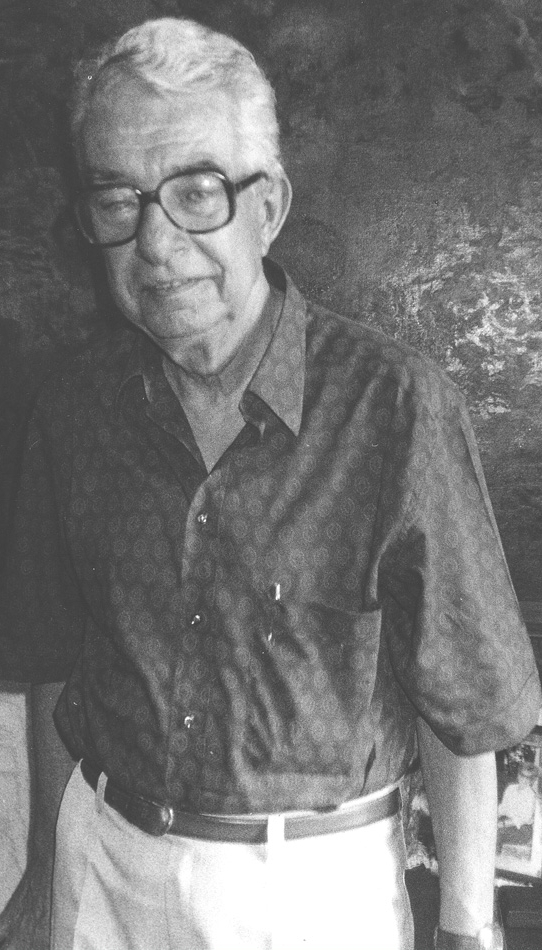 Dario Guzzon, fumettista, componente della EsseGesse - insieme a Giovanni Sinchetto e Pietro Sartoris - trio di autori che hanno creato Il Grande Blek, Capitan Miki, Comndante Mark, Alan Mistero. Ritratto fotografico di Joe Zattere, 1994